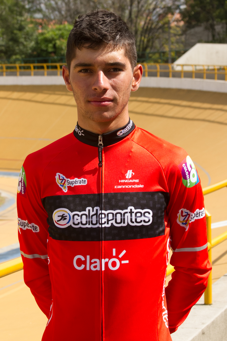 Entrenamiento Equipo Sub 23 Coldeportes Claro, previo a la Vuelta de la Juventud. Agosto 2 de 2013 Foto: Coldeportes Claro (Lina Lopera)